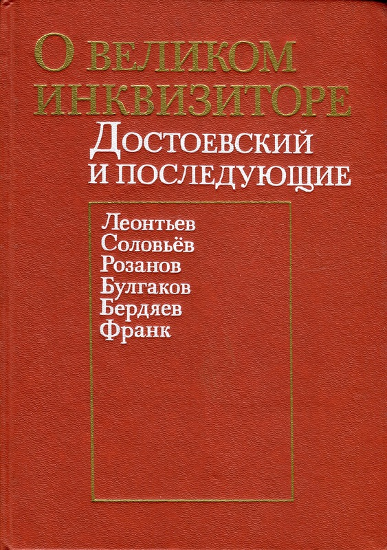 Сборник "О Великом инквизиторе. Достоевский и последующие". Обложка издания 1991 года